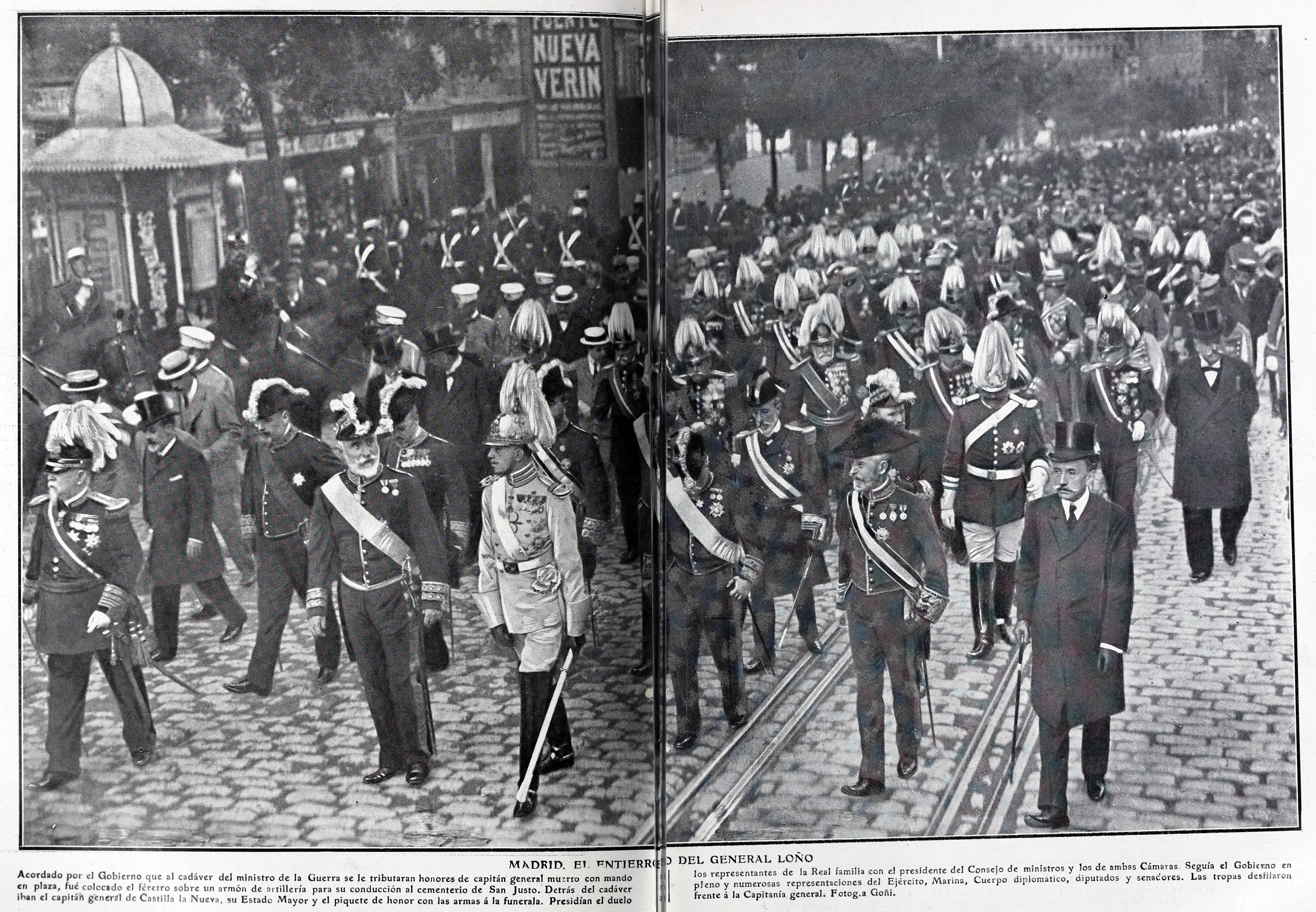 Madrid. El entierro del general Loño.